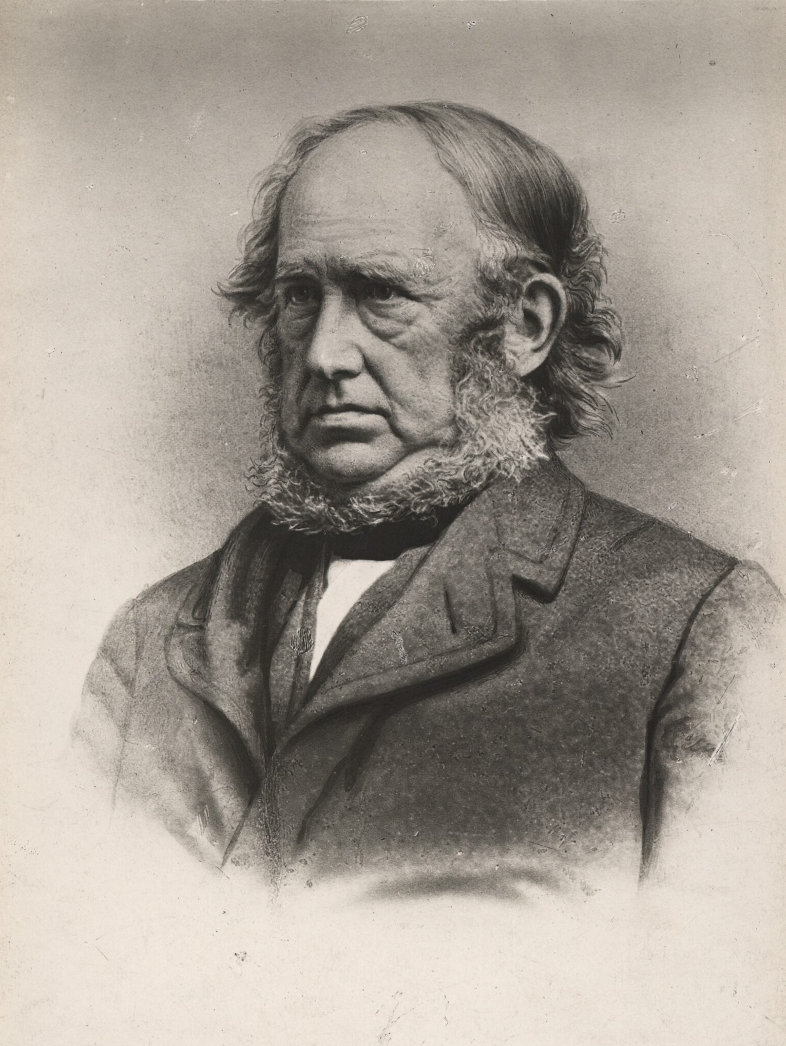 Andreas Frederik Krieger (4. oktober 1817- 27. september 1893) var en dansk jurist, nationalliberal politiker, - indenrigsminister 1856 - 1858 og finansminister 1872 - 1874.